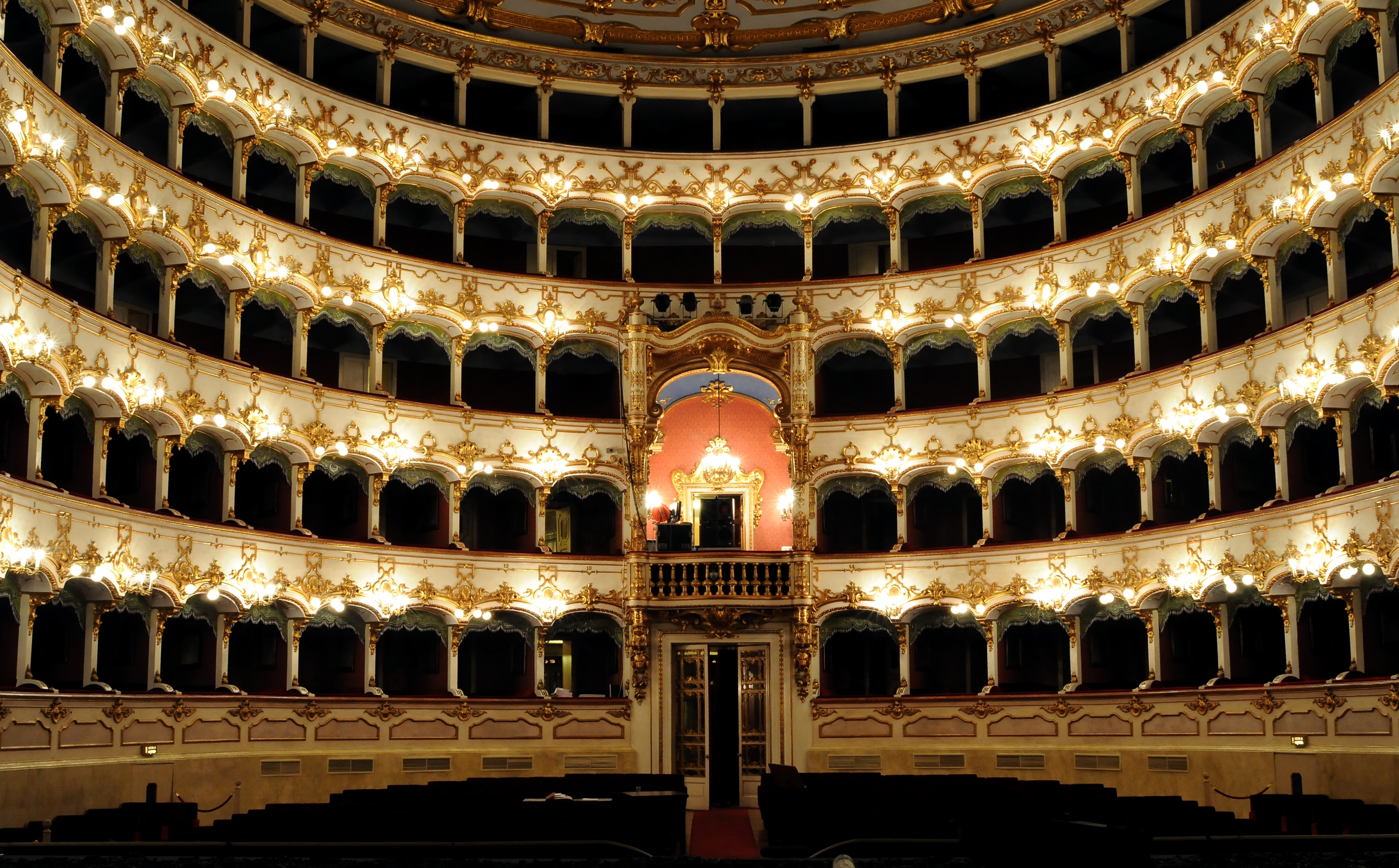 Teatro Municipale di Piacenza This is a photo of a monument which is part of cultural heritage of Italy.